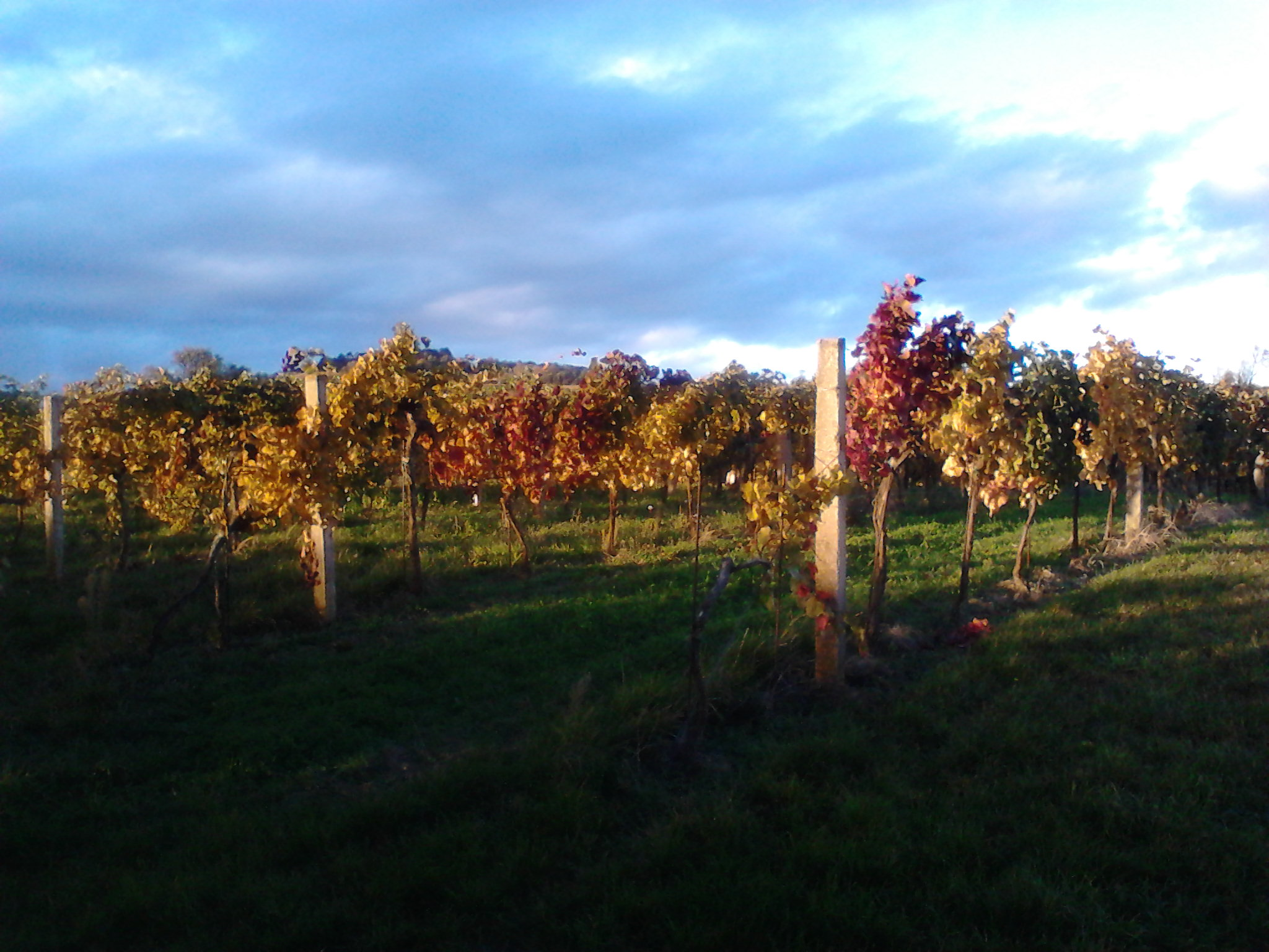 Eichkogel - fotografiert mit 3.2 Megapixel Handykamera, unbearbeitet This media shows the nature reserve in Lower Austria with the ID 3.